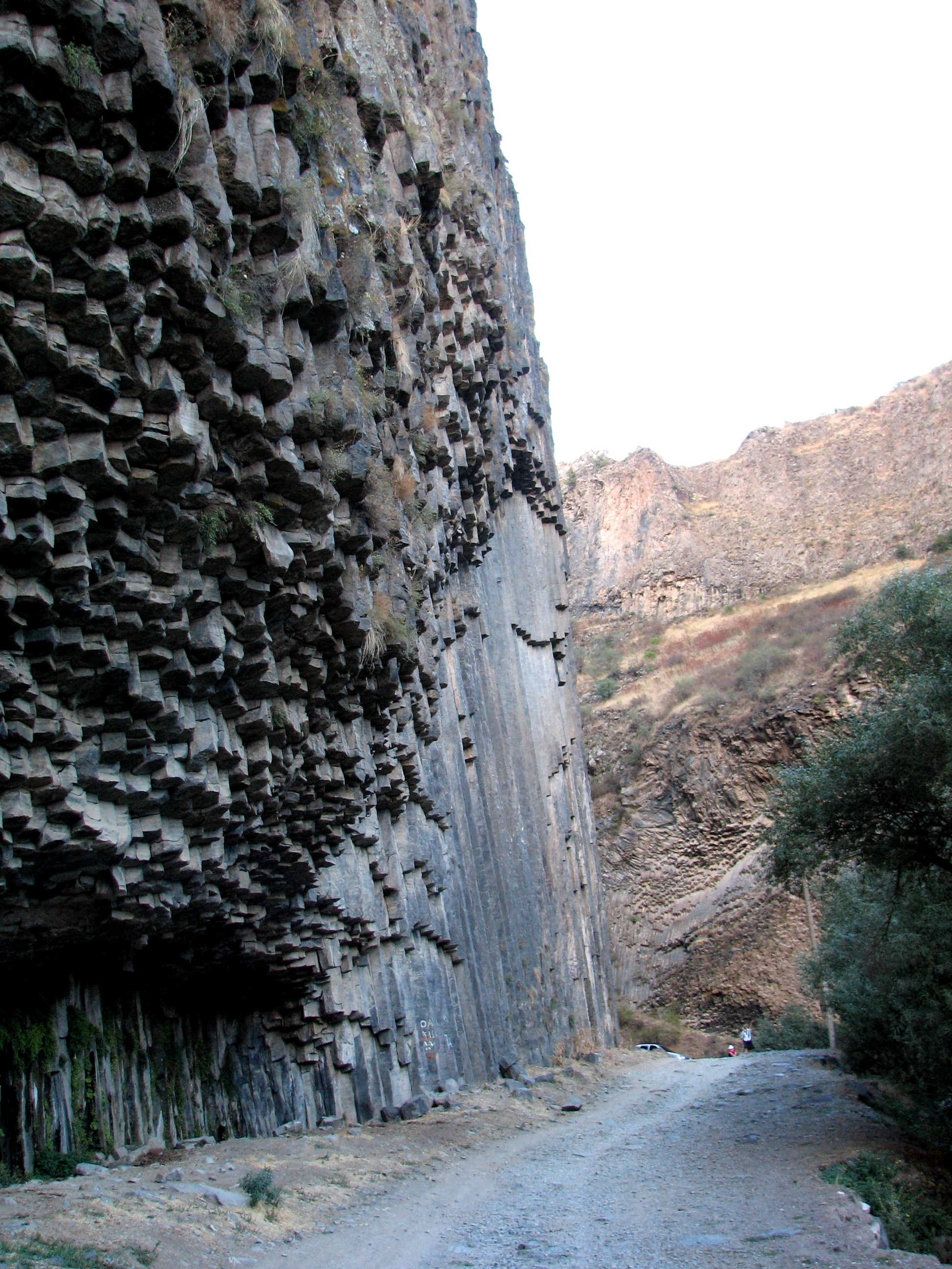 Garni Gorge is situated 23 km east of Yerevan, Armenia קניון גרני נמצא מזרחית לירוואן בירת ארמניה. התופעה המייחדת את הקניון הם עמודי בזלת בצורת משושים